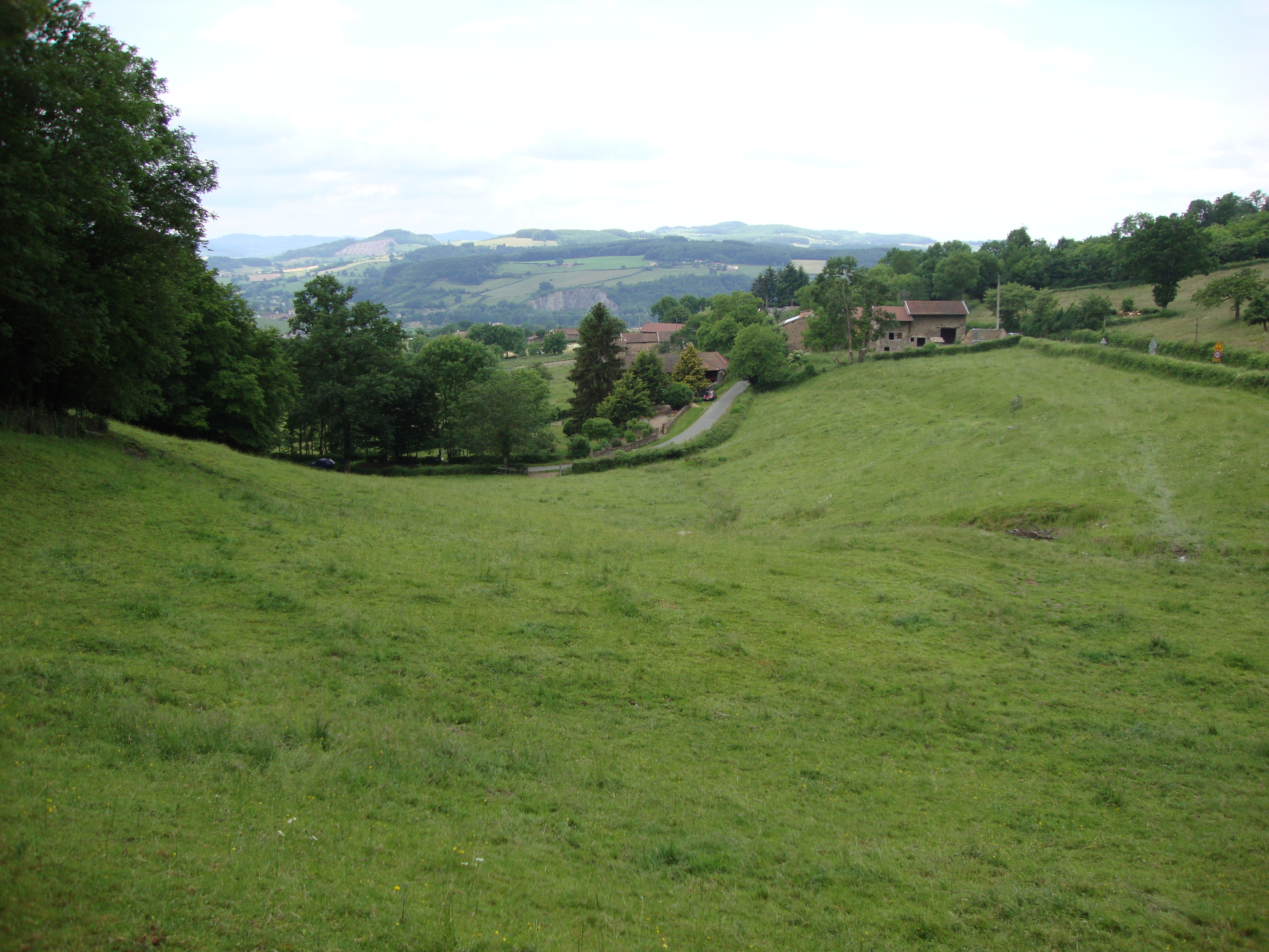 Tramayes (Saône-et-Loire, Fr) paysage avec vue sur La Montille